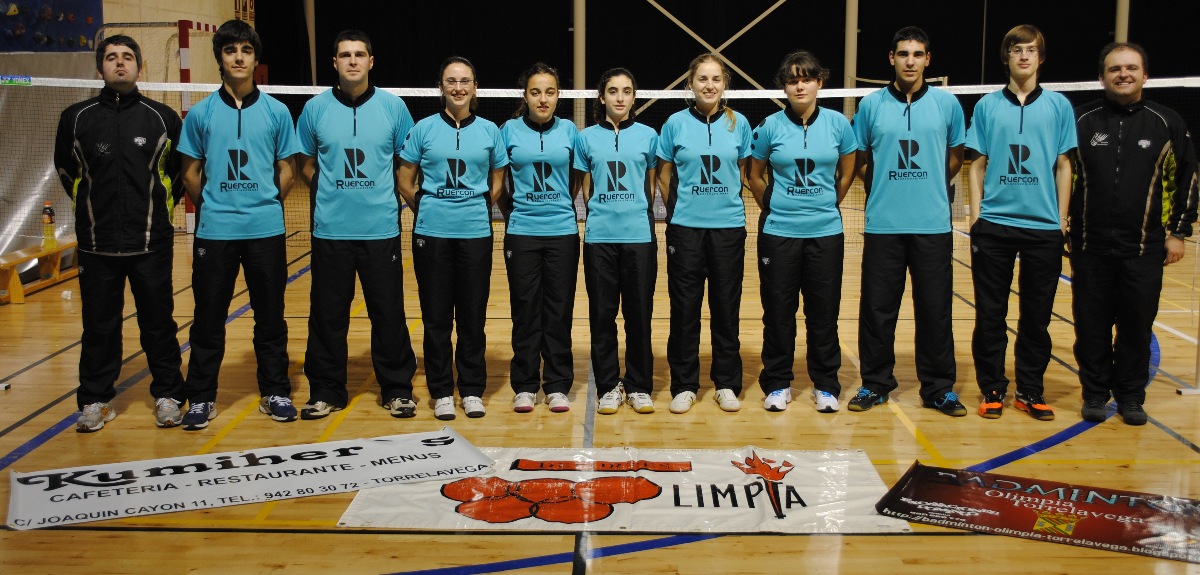 Fotografía correspondiente a los equipos participantes en la Liga Norte de Clubes de bádminton de la temporada 2012/2013